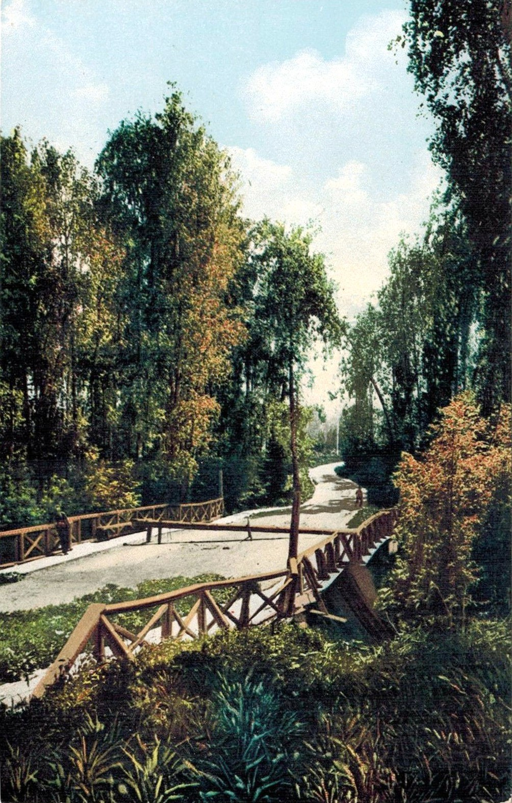 В 1891 году в Университетской роще был построен деревянный мостик через речку Еланку (Медичку). В 1909 году на месте деревянного моста архитектором Андреем Крячковым был построен новый каменный мост в стиле модерн.